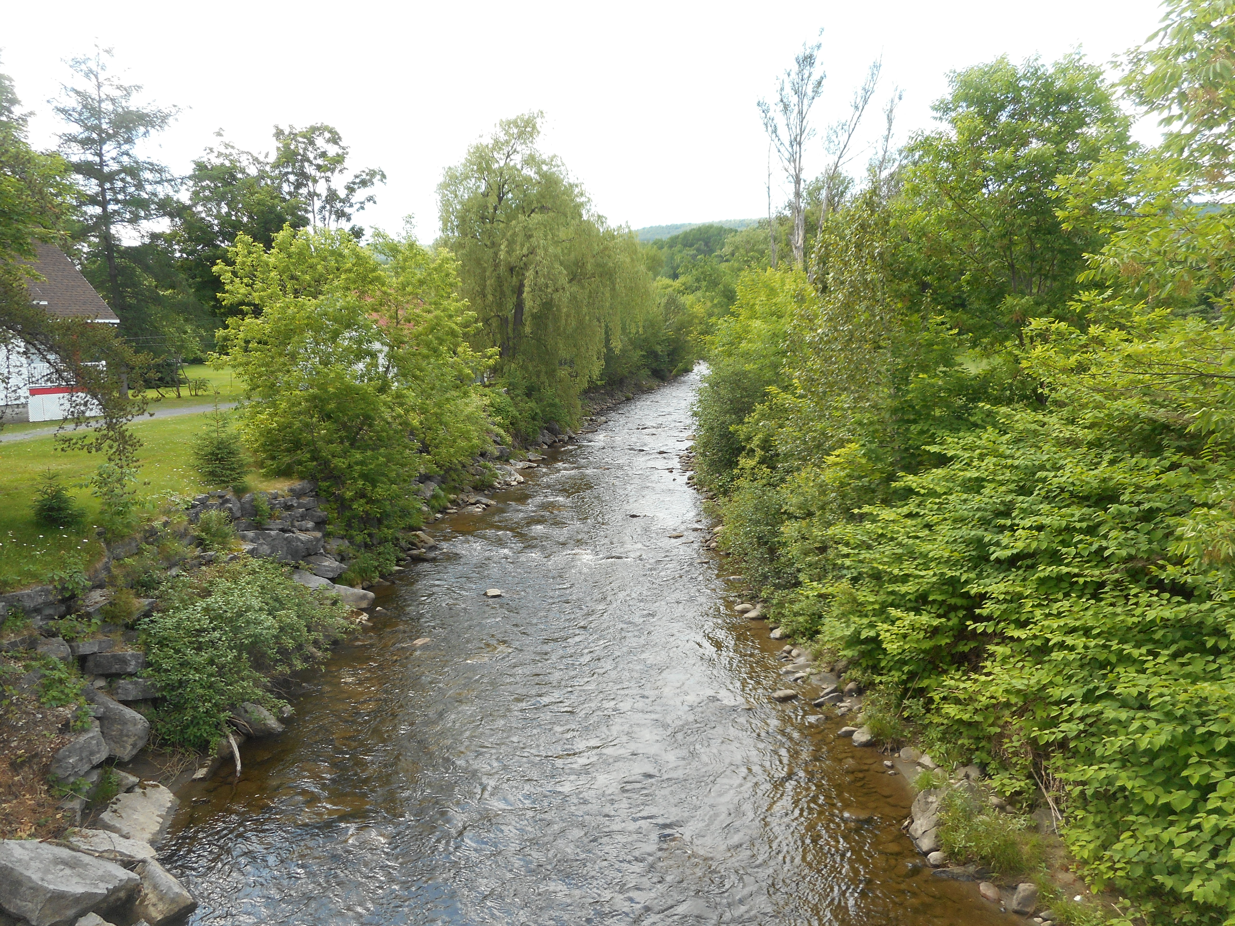 La rivière aux Chiens sert de limite entre Beaupré et Château-Richer. Vue du pont de la route 360, regardant vers l'amont (le nord-ouest)